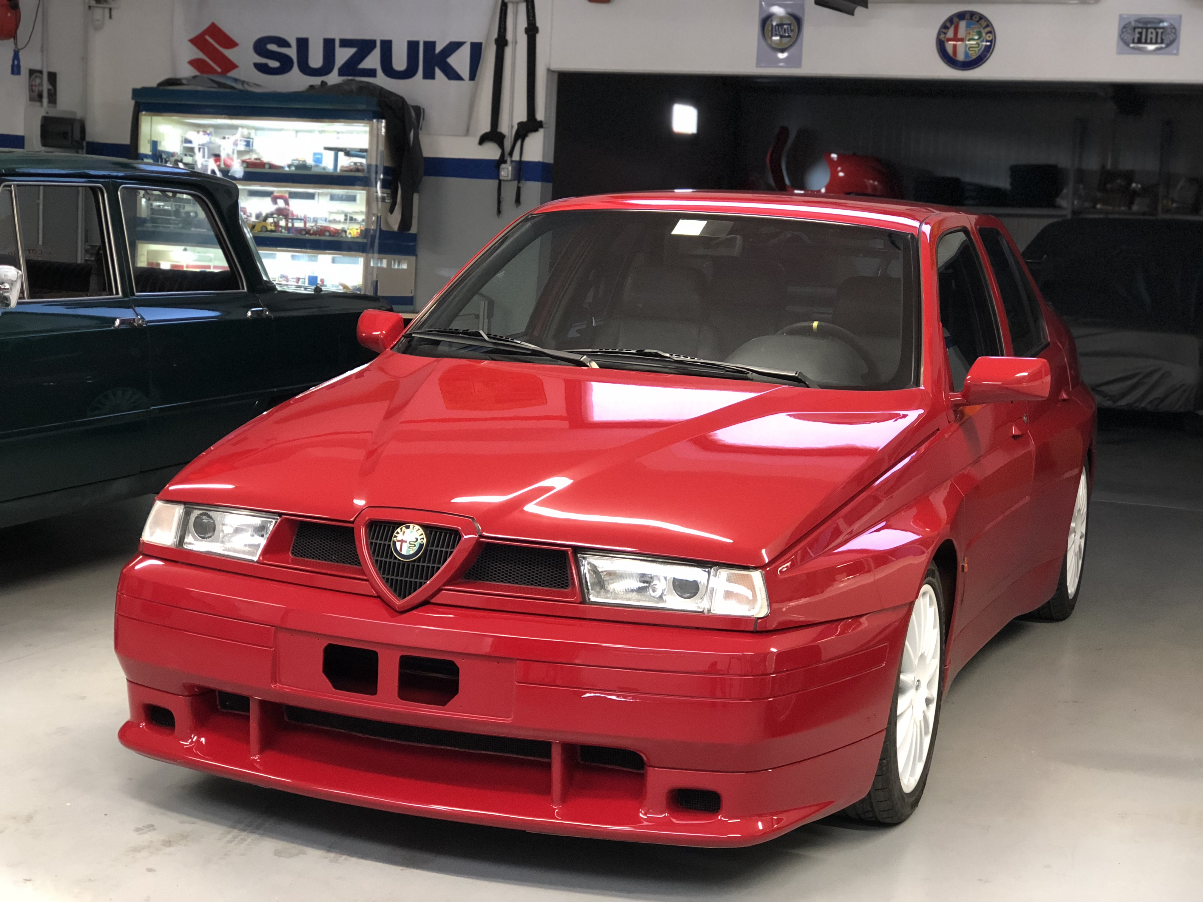 foto di Gennaio 2018